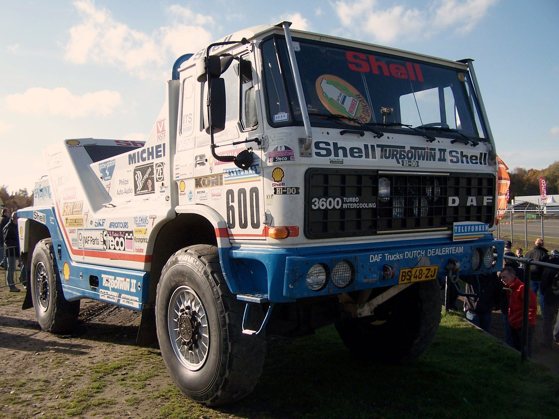 DAF Turbotwin II